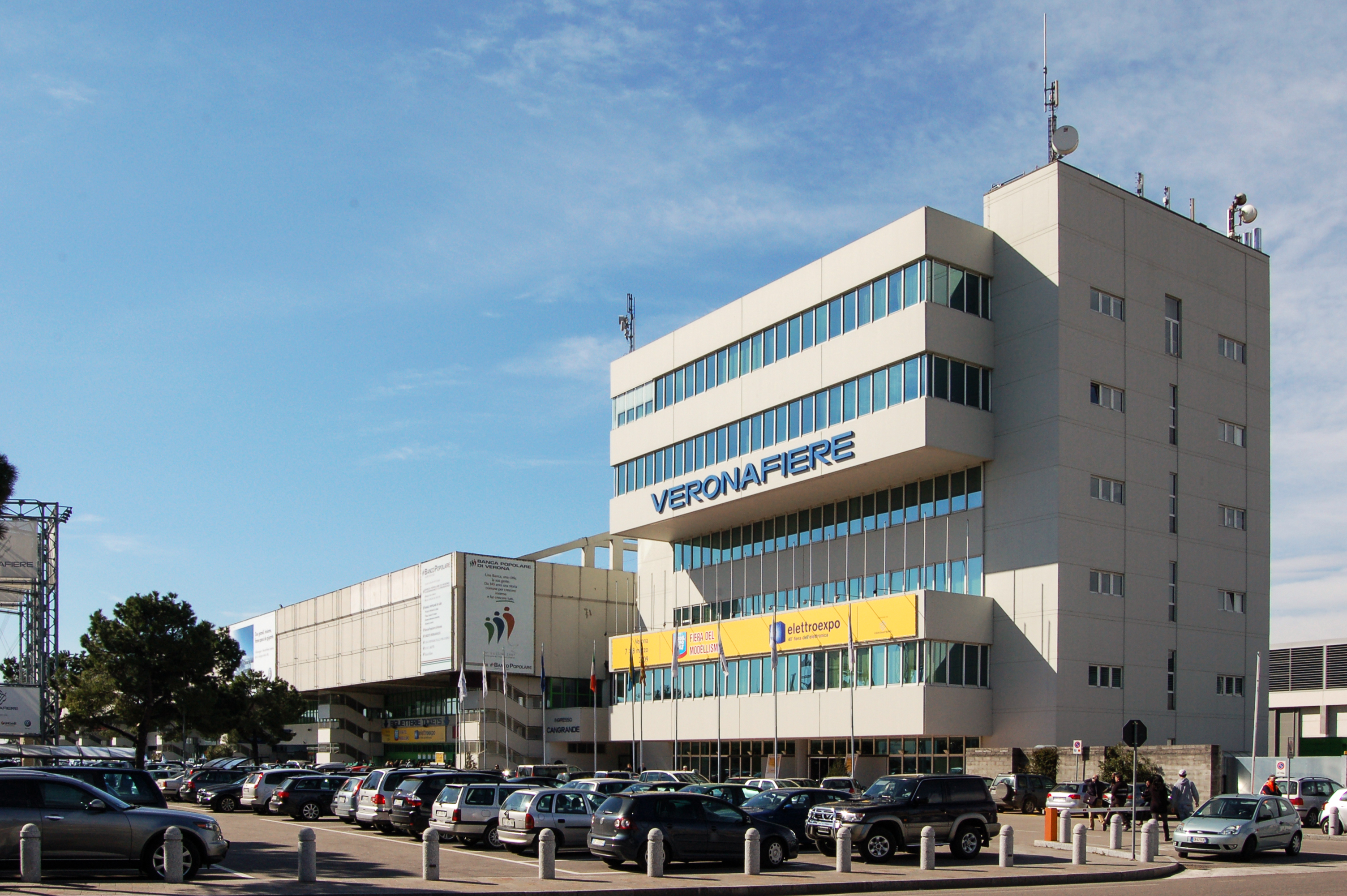 Ingresso della fiera di Verona